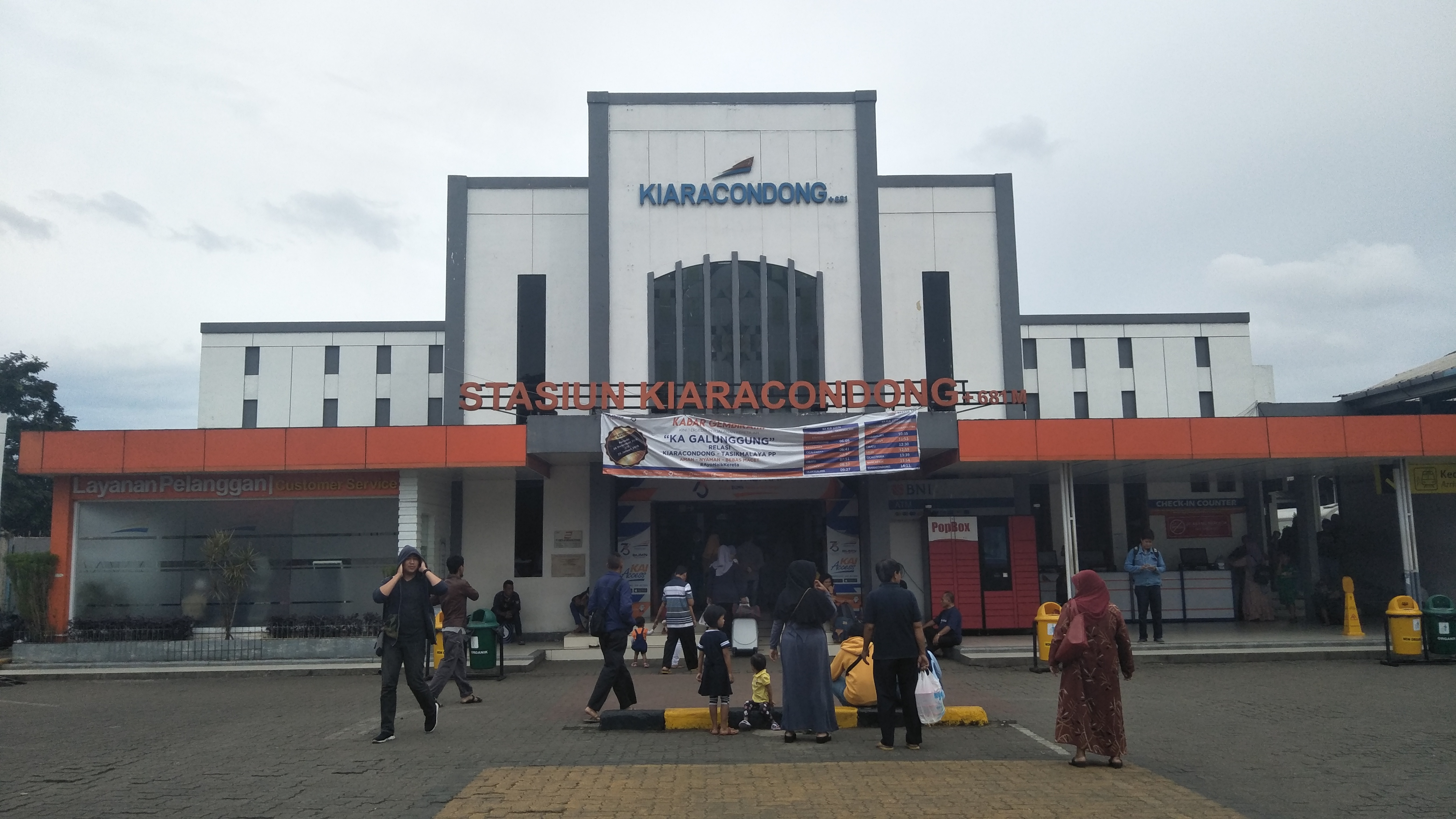 Stasiun Kiaracondong tampak depan